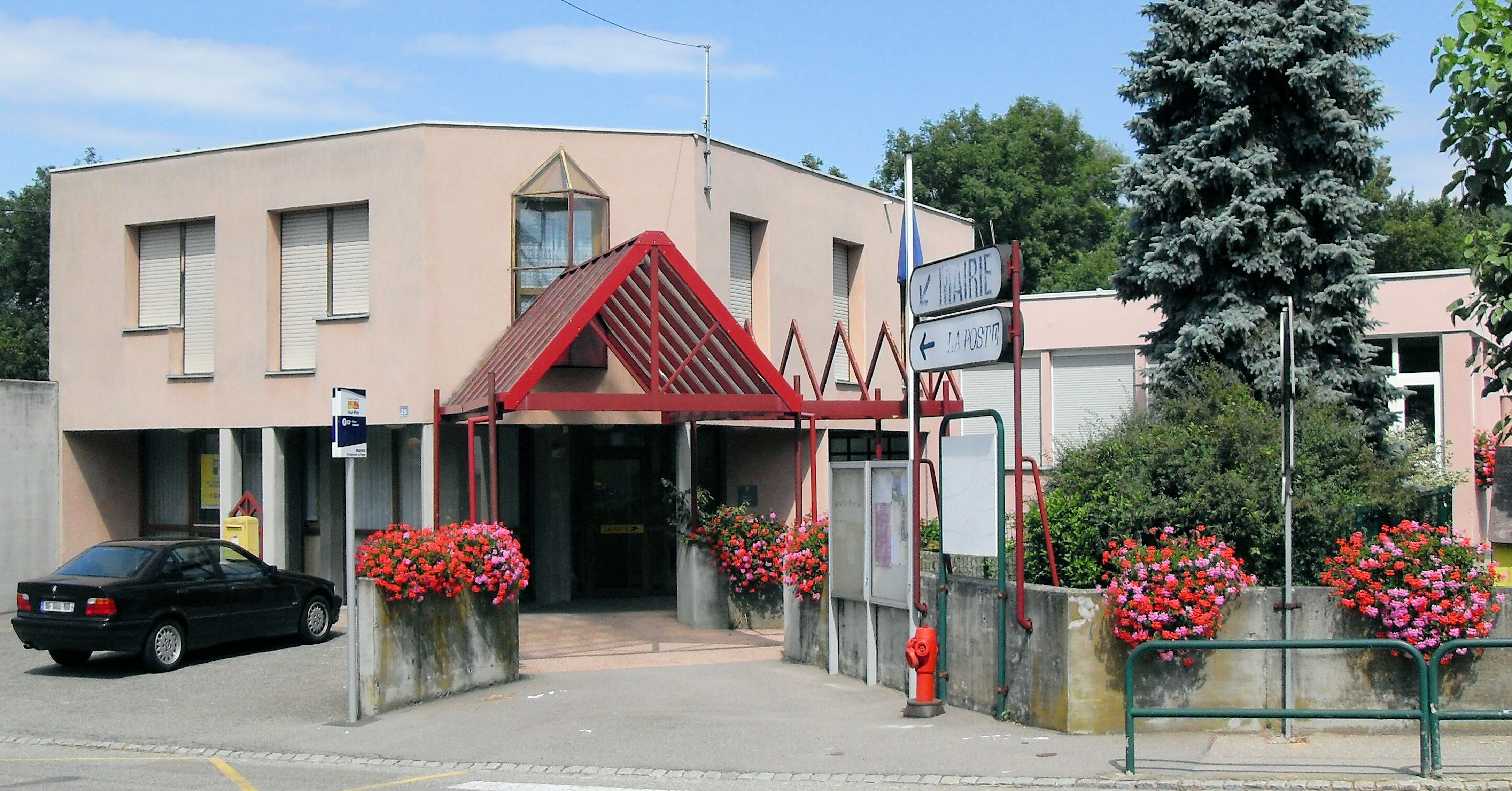 La mairie de Muespach